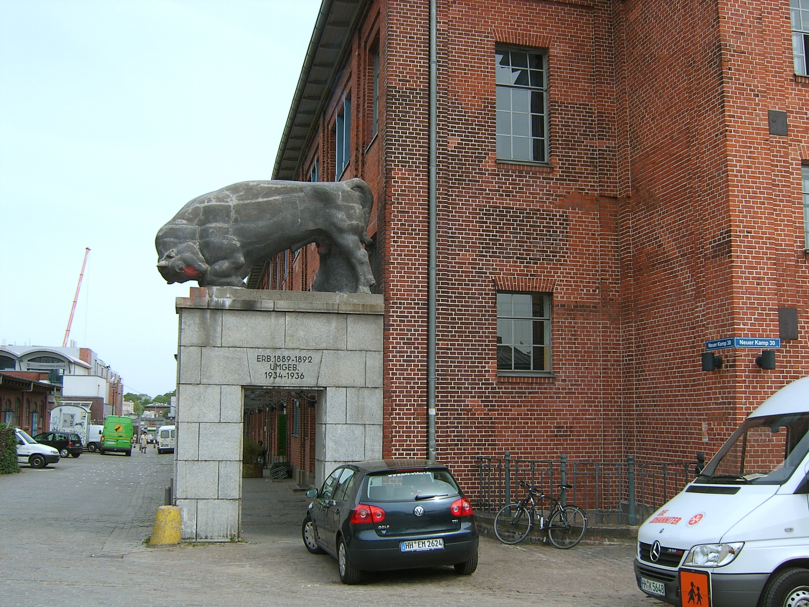 Die „Alte Rinderschlachthalle“ wurde 1889-92 erbaut und liegt heute außerhalb des Fleischgroßmarktes Hamburg. Vor ihrem Eingang steht eine Rinderskulptur. This is a photograph of an architectural monument.